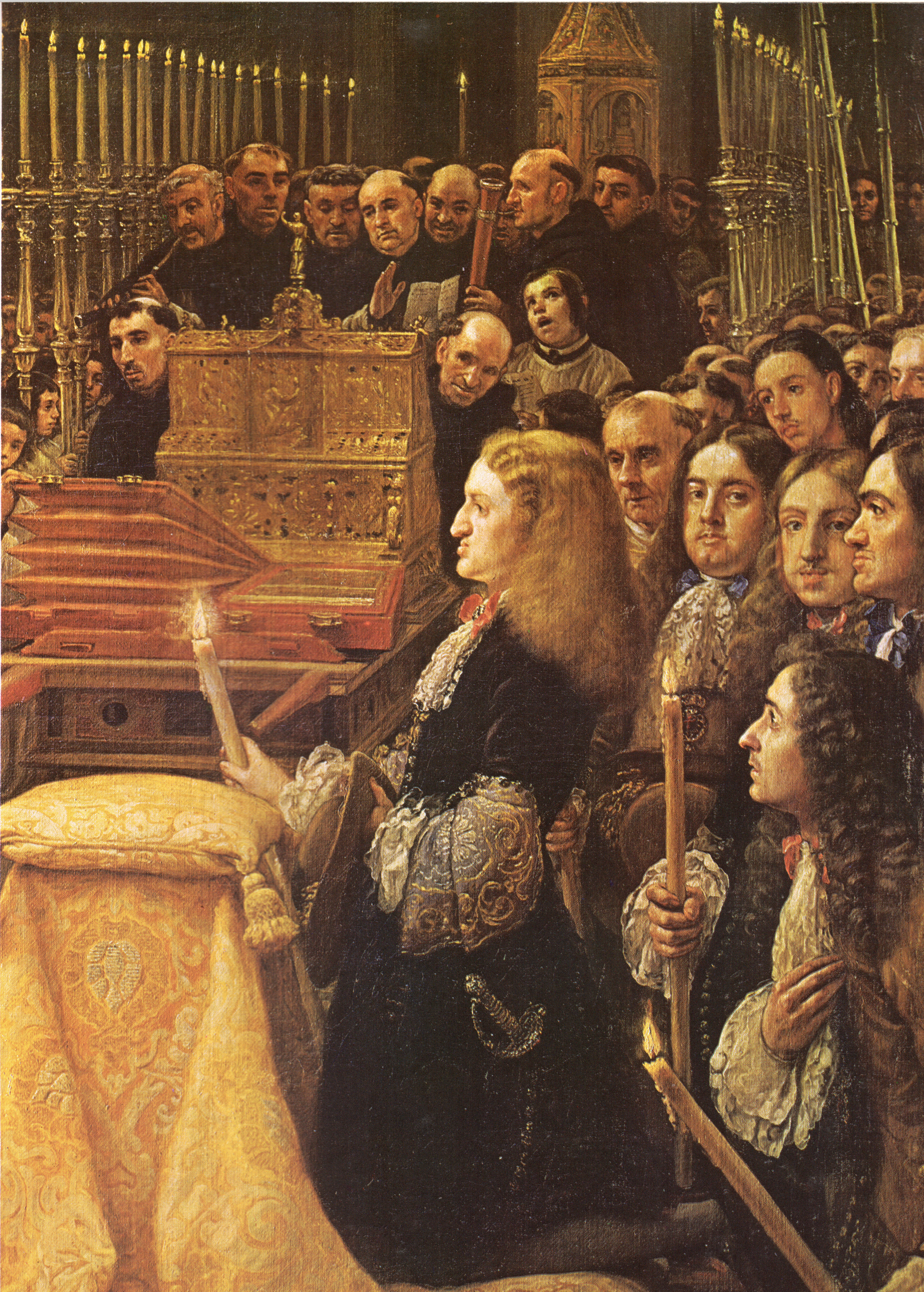 Carlos II de Espana recibe la sagrada forma (detalle), por Claudio Coello.